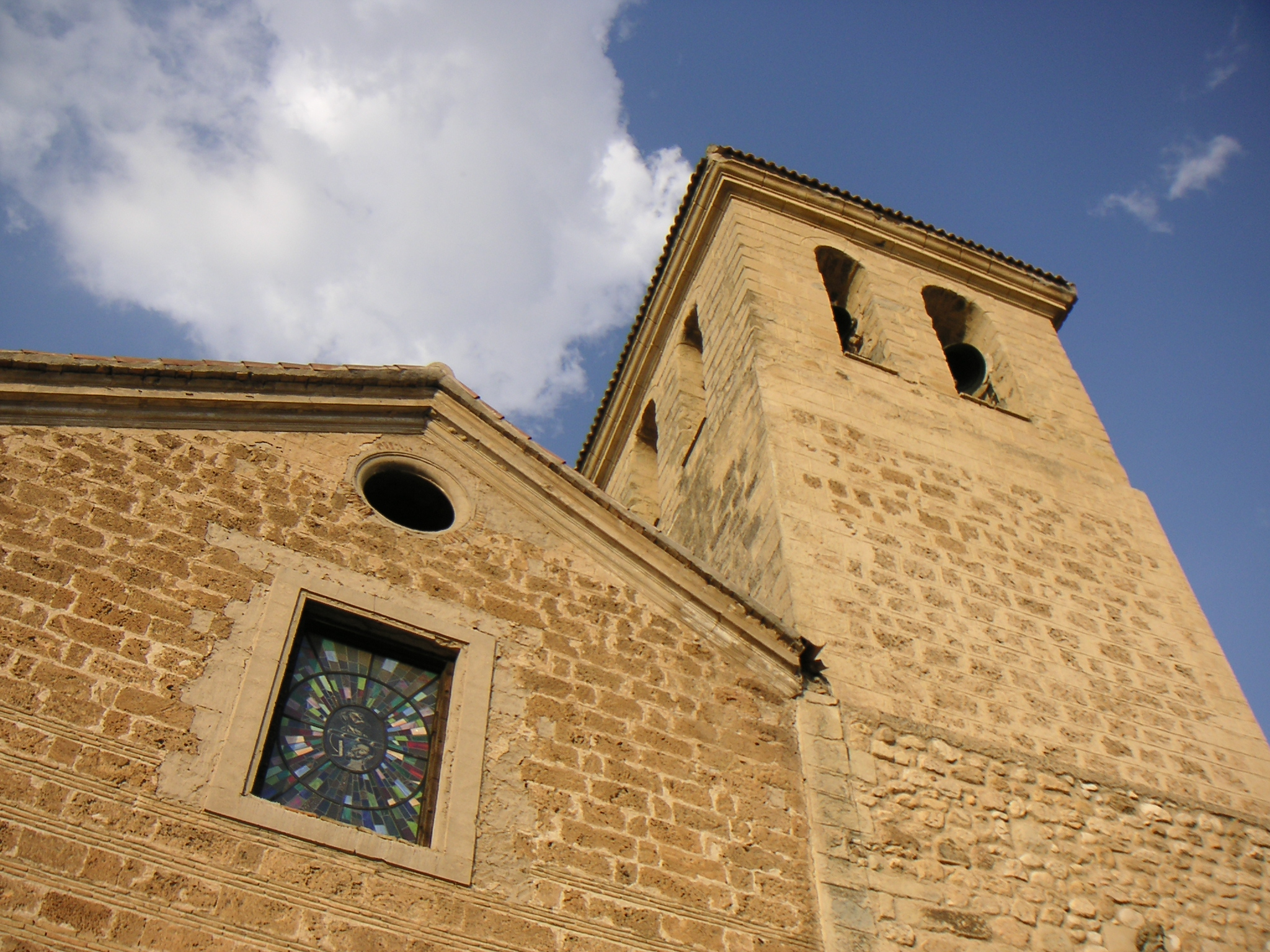 Iglesia de San Pedro y San Pablo, en Quesada, Jaén.